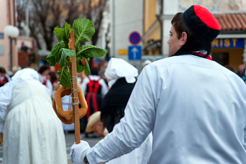 Mesopusni utorak u Selcu kod Crikvenice. Mlaća prazne slame i selačko kolo.